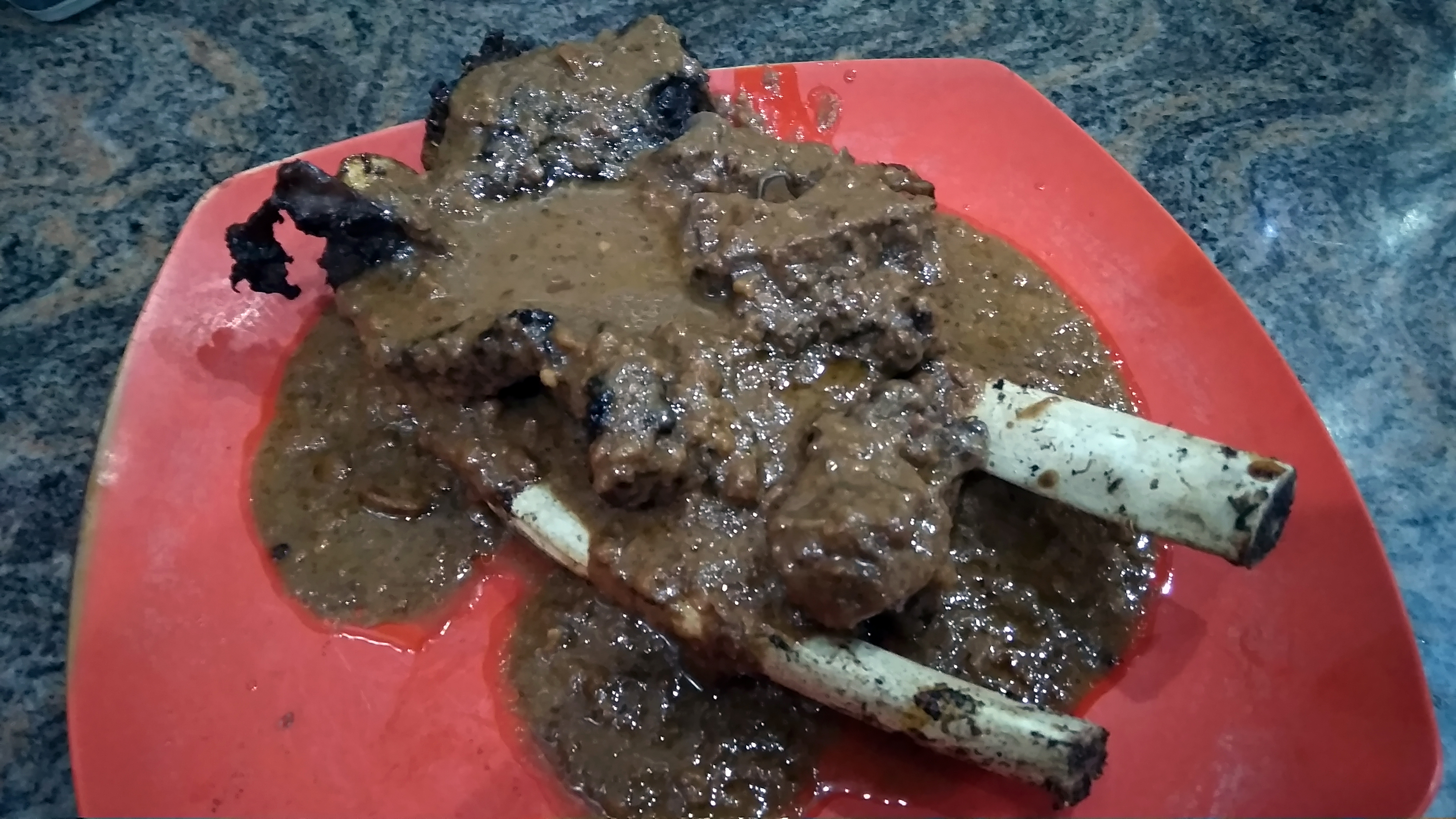 Konro bakar adalah makanan khas Makassar, Sulawesi Selatan. Makanan ini merupakan varian dari sup konro.